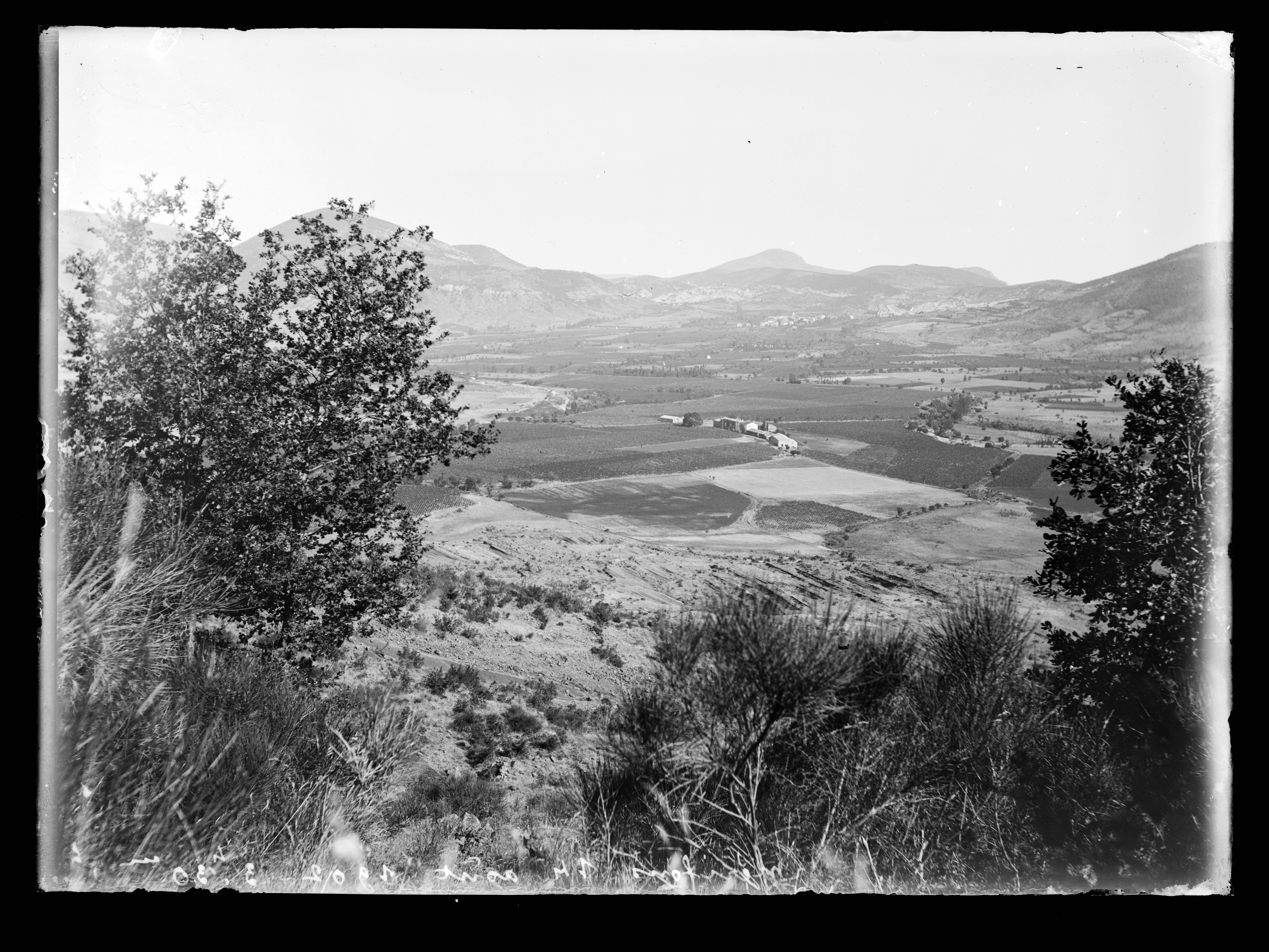 Mérifons. - Paysage, 14 août 1902, 3h30 : photographie.